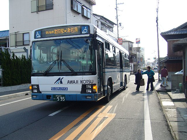 淡路交通 路線バス車 片浜バス停（淡路市岩屋）にて（画像の595は廃車済み）